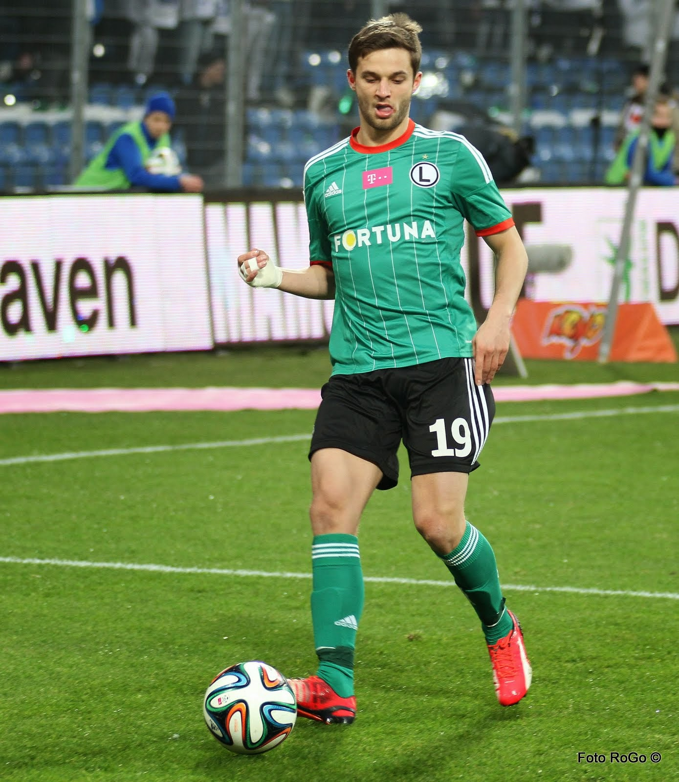 Bartosz Bereszyński playing for Legia Warsaw in 2015